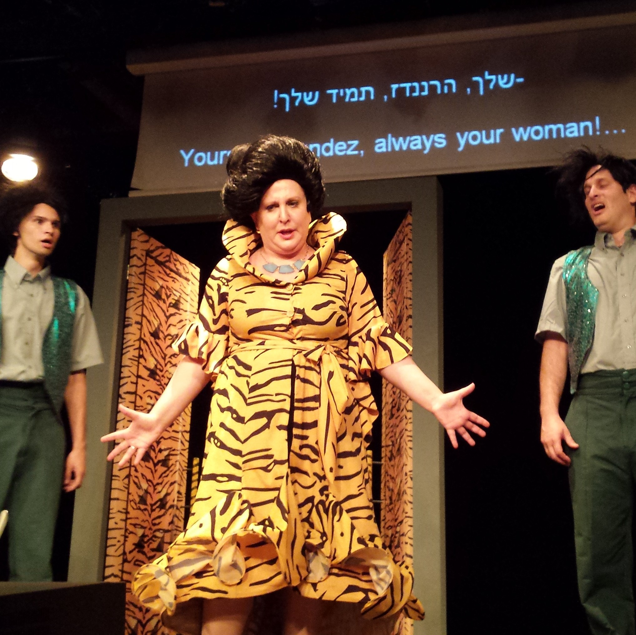 הפקת "האישה המופלאה שבתוכנו", 2015